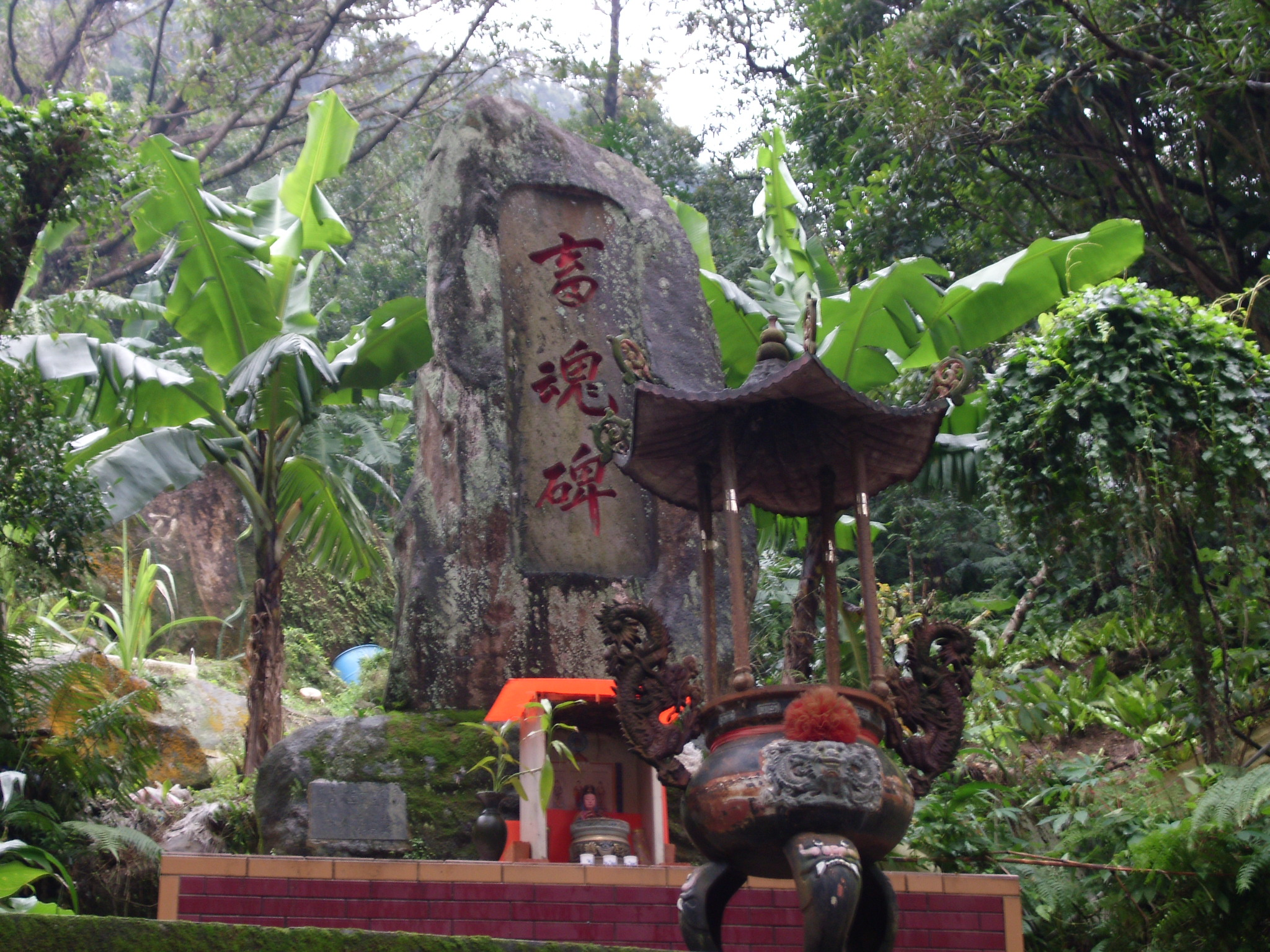 中文（台灣）: 畜魂碑，位於台北四獸山天寶聖道宮山門外，原立於大同區蘭州街屠宰場。